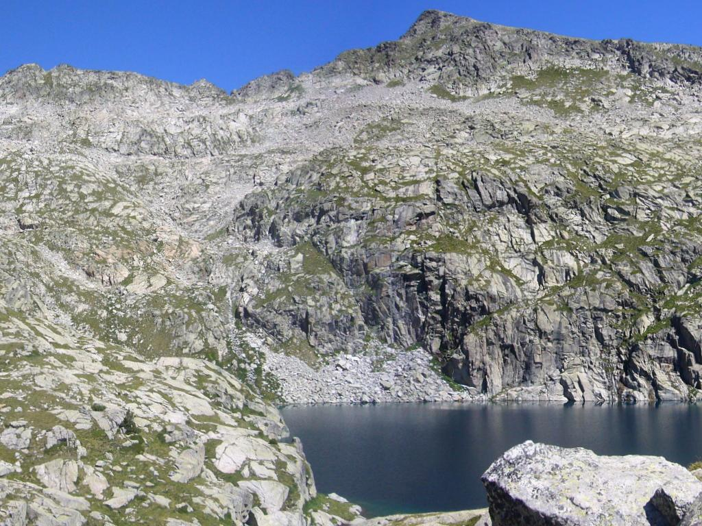 Pic del Bergús i Portau de Colomèrs vistos des de l'Estanys del Bergús; Espot, Pallars Sobirà, Catalunya